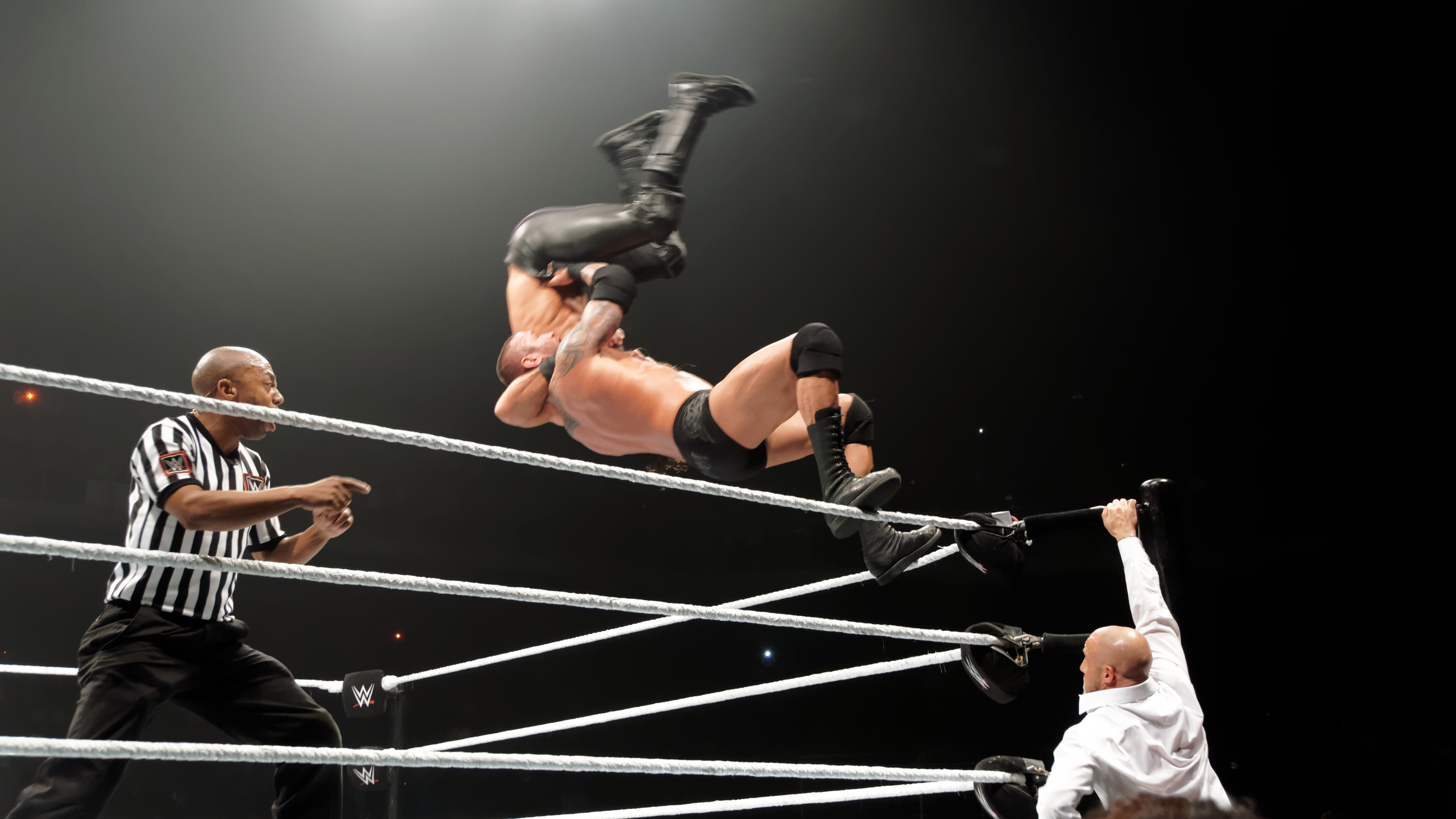 WWE Live@Lotto Arena - Antwerpen